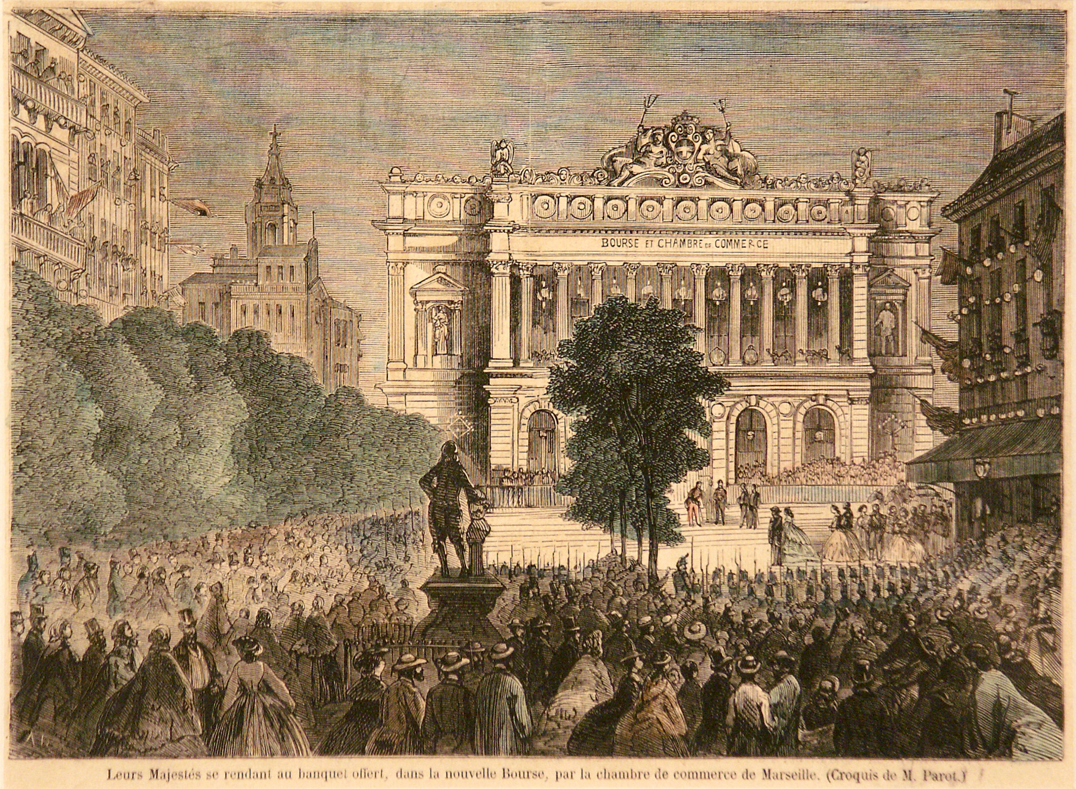 Gravure